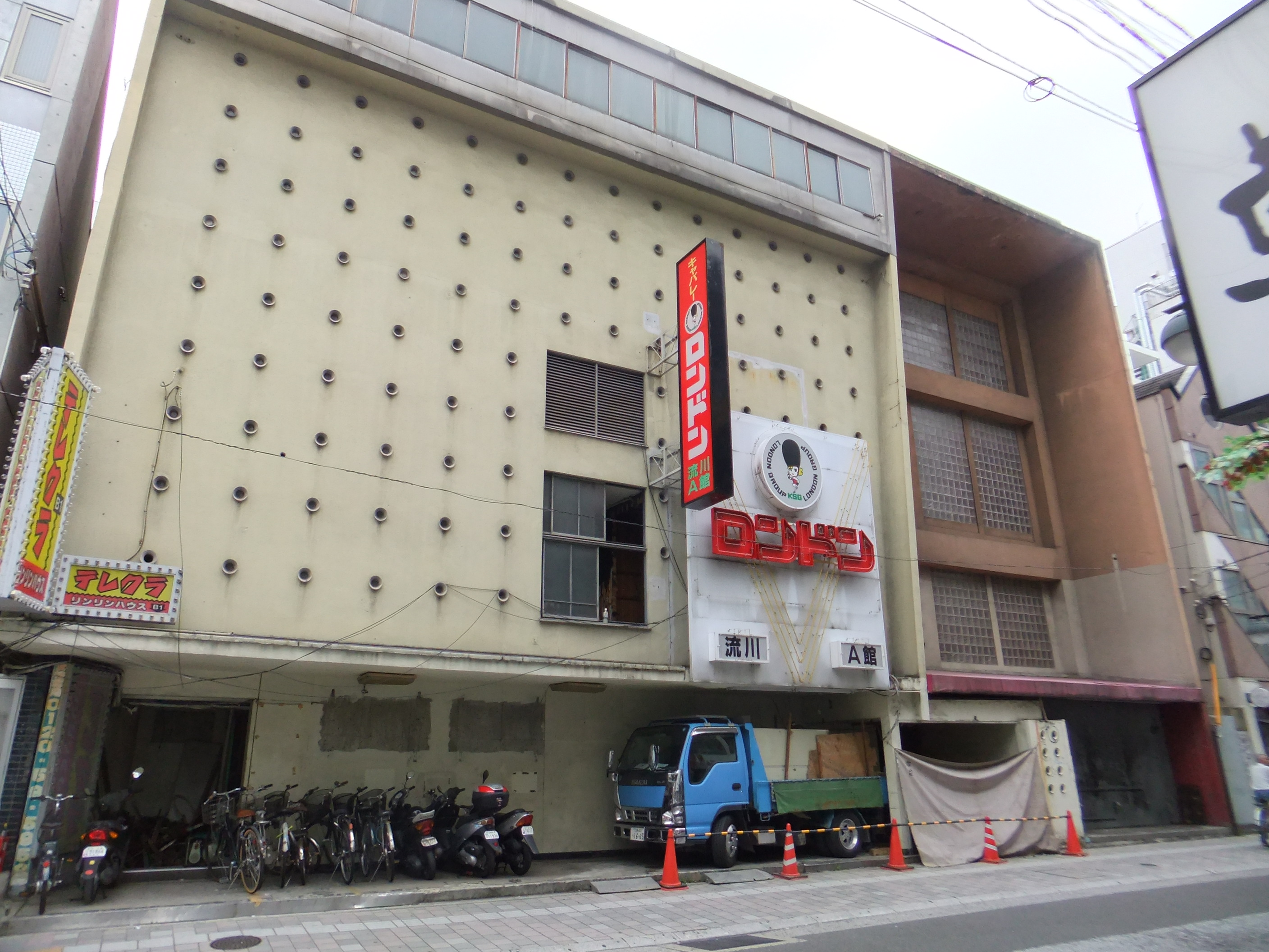 キャバレーロンドン流川A館